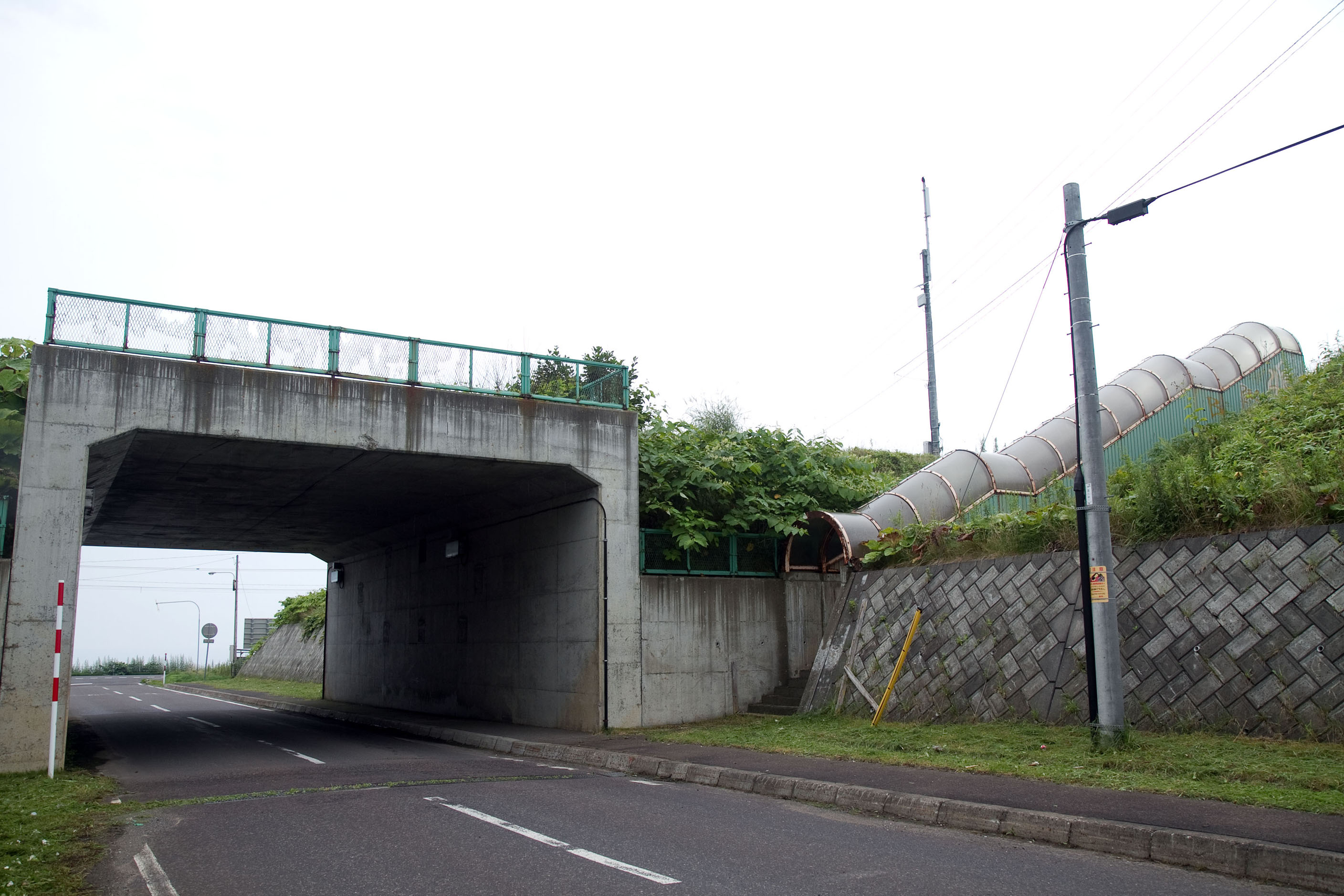 現在もホームに上がる屋根付き階段が残されている